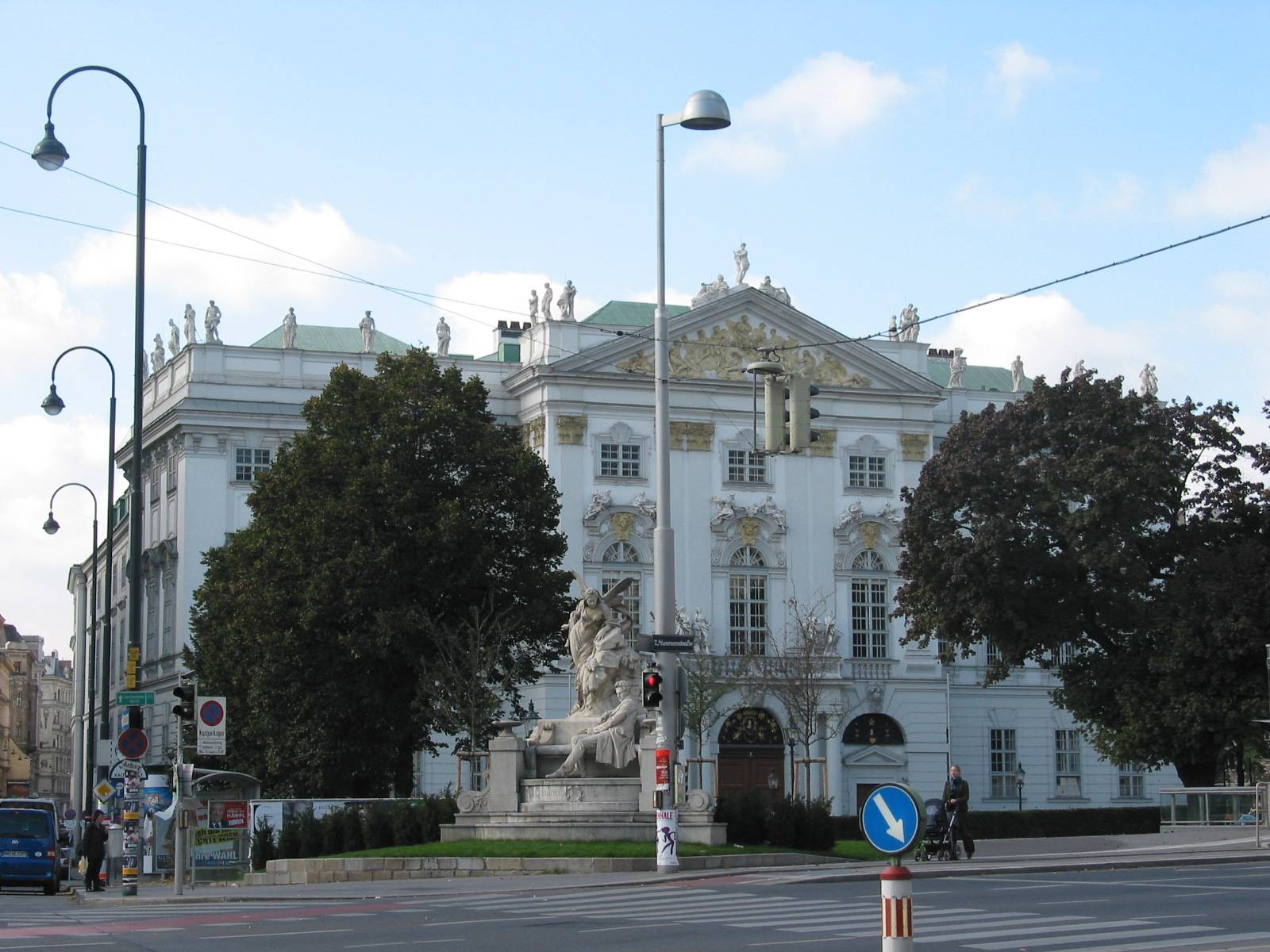 Palais Trautson, Vienna VII, 2005-10-16 selfmade photo